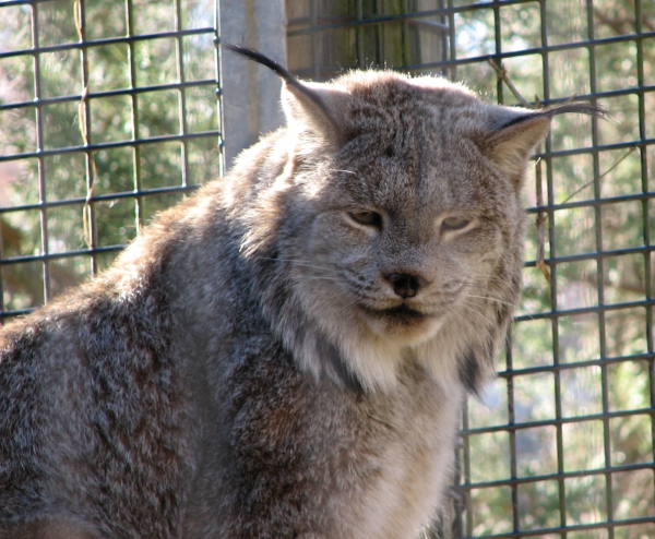 Lynx